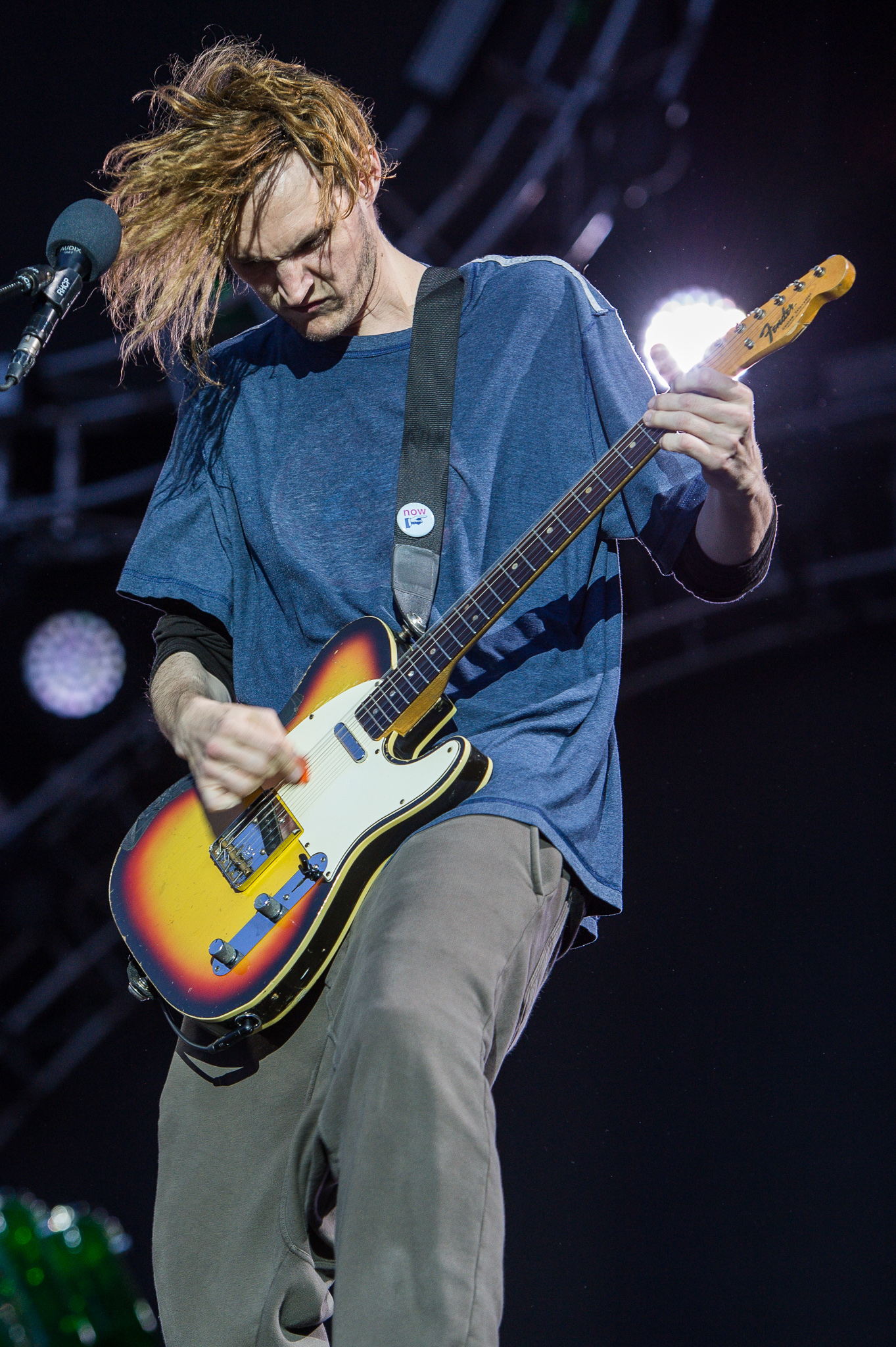 ARGO-Konzerte,Festival,Josh Klinghoffer,Konzert,Livekonzert,Livemusik,Musik,Red Hot Chili Peppers,RiP,Rock im Park 2016,Seat Zeppelin Stage